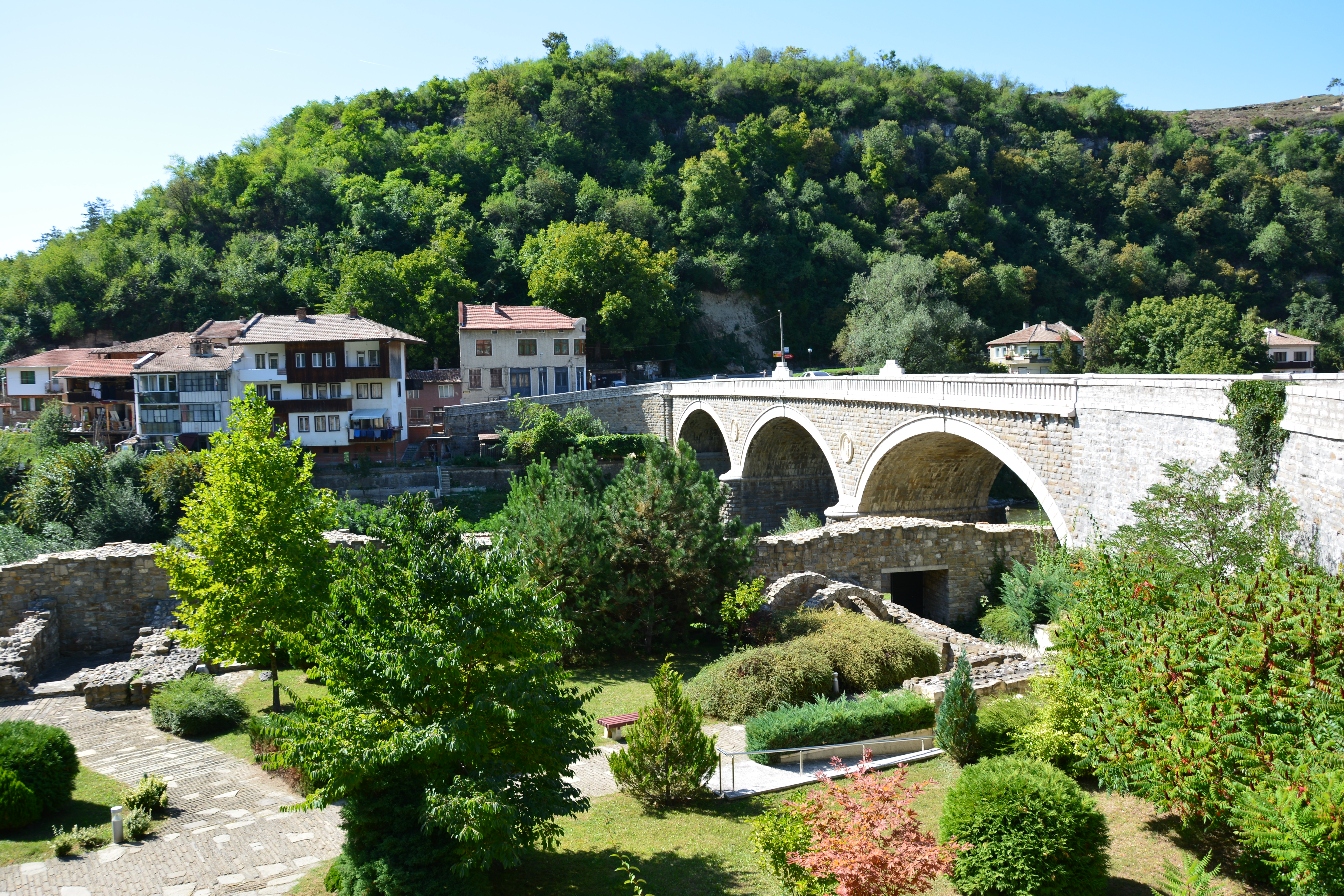 Историческо селище Велико Търново